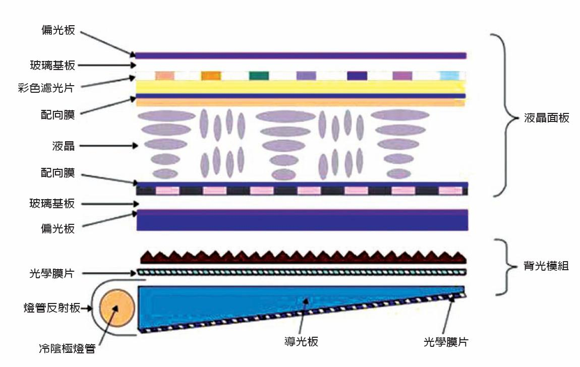 LCD構造